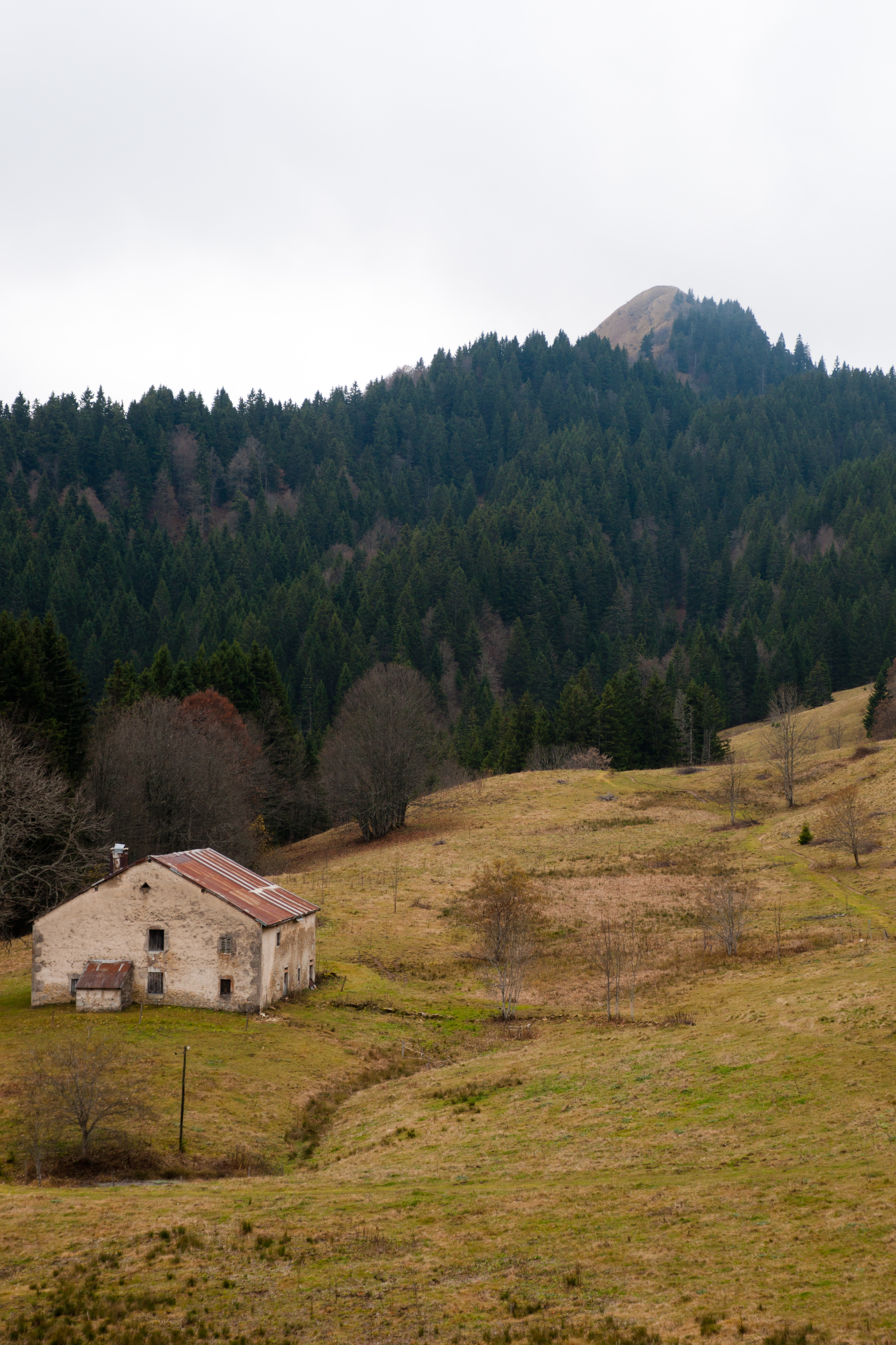 Sommet du Crêt de Chalam dans le Jura français, photo prise depuis la Borne au Lion (commune de La Pesse).